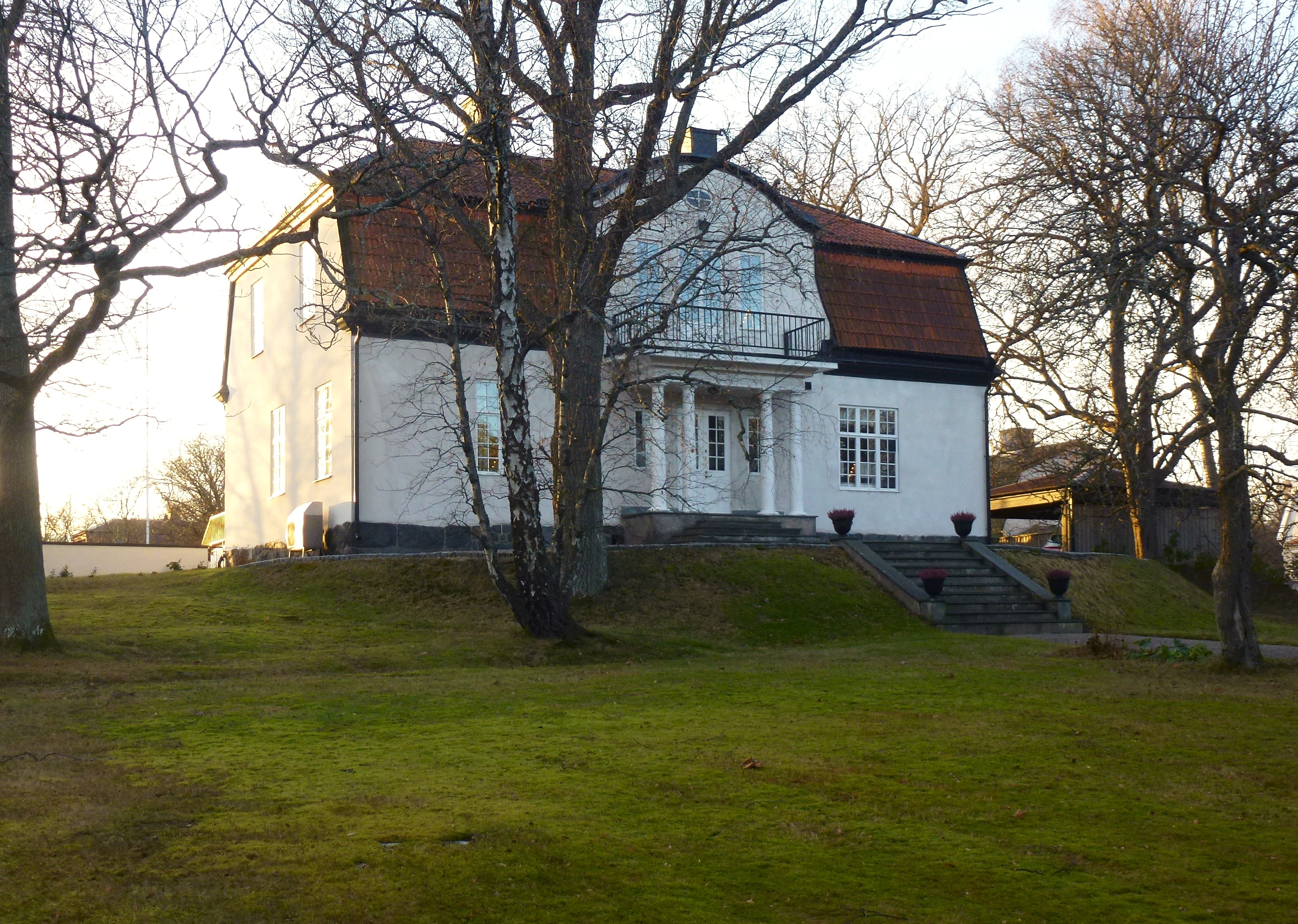 La Fére, villan på Lindvägen 16 ritades år 1904 av arkitekt Hugo Rahm på uppdrag av Gustaf de Frumerie. Här växte senare kompositören Gunnar de Frumerie upp.